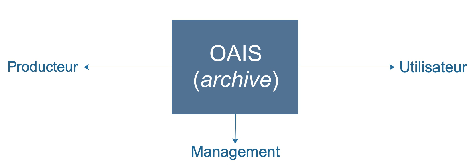 Positionnement de l'archive au sein de son environnement constitué de producteurs, d'utilisateurs et du management.